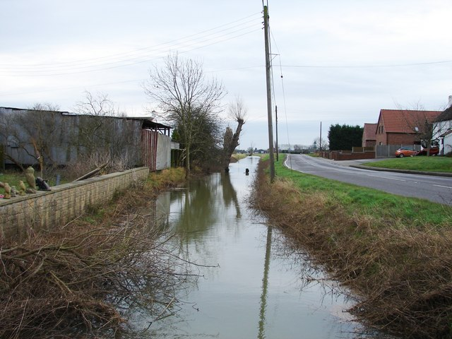 Car Dyke